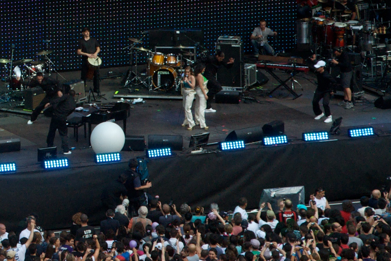 Paola & Chiara, Amiche per l'Abruzzo, Stadio Giuseppe Meazza di San Siro a Milano, 21-06-2009